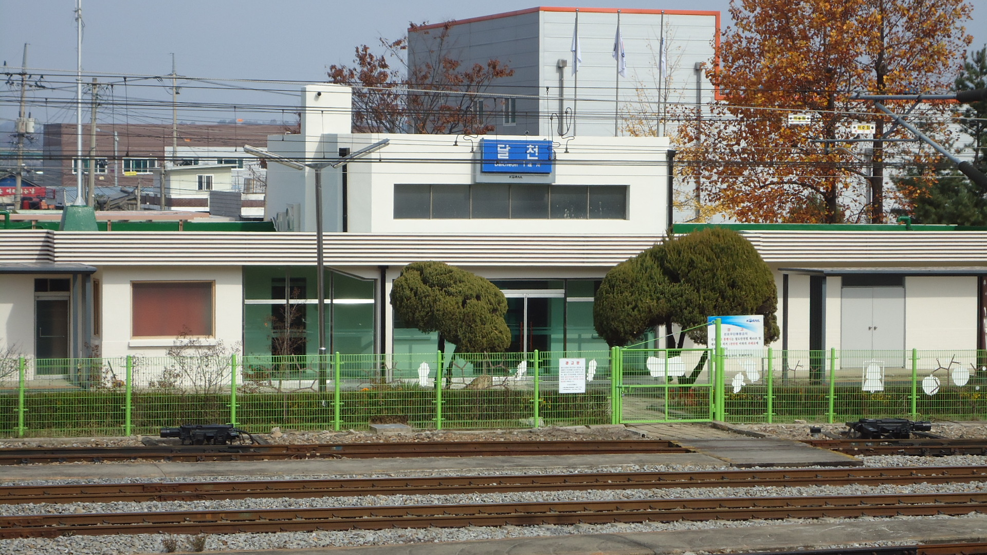 달천역 뒤쪽 모습. 현재는 리모델링되서 미술관으로 사용되고 있다.